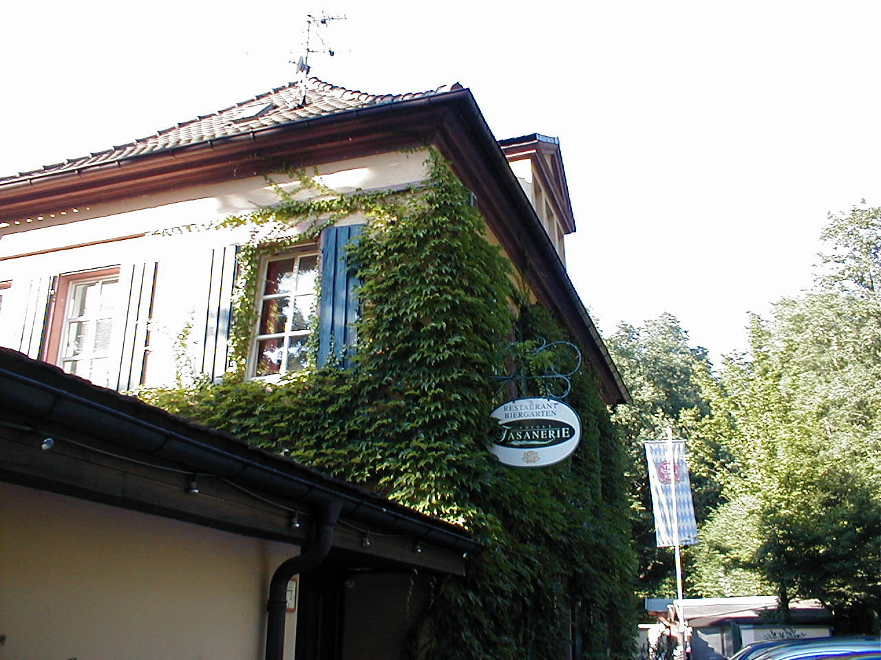 Biergarten in der Aschaffenburger Fasanerie, beer garden in Aschaffenburg Fasanerie